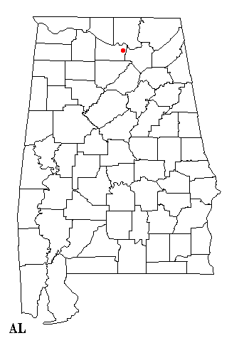 Morgan City, Alabama DOT